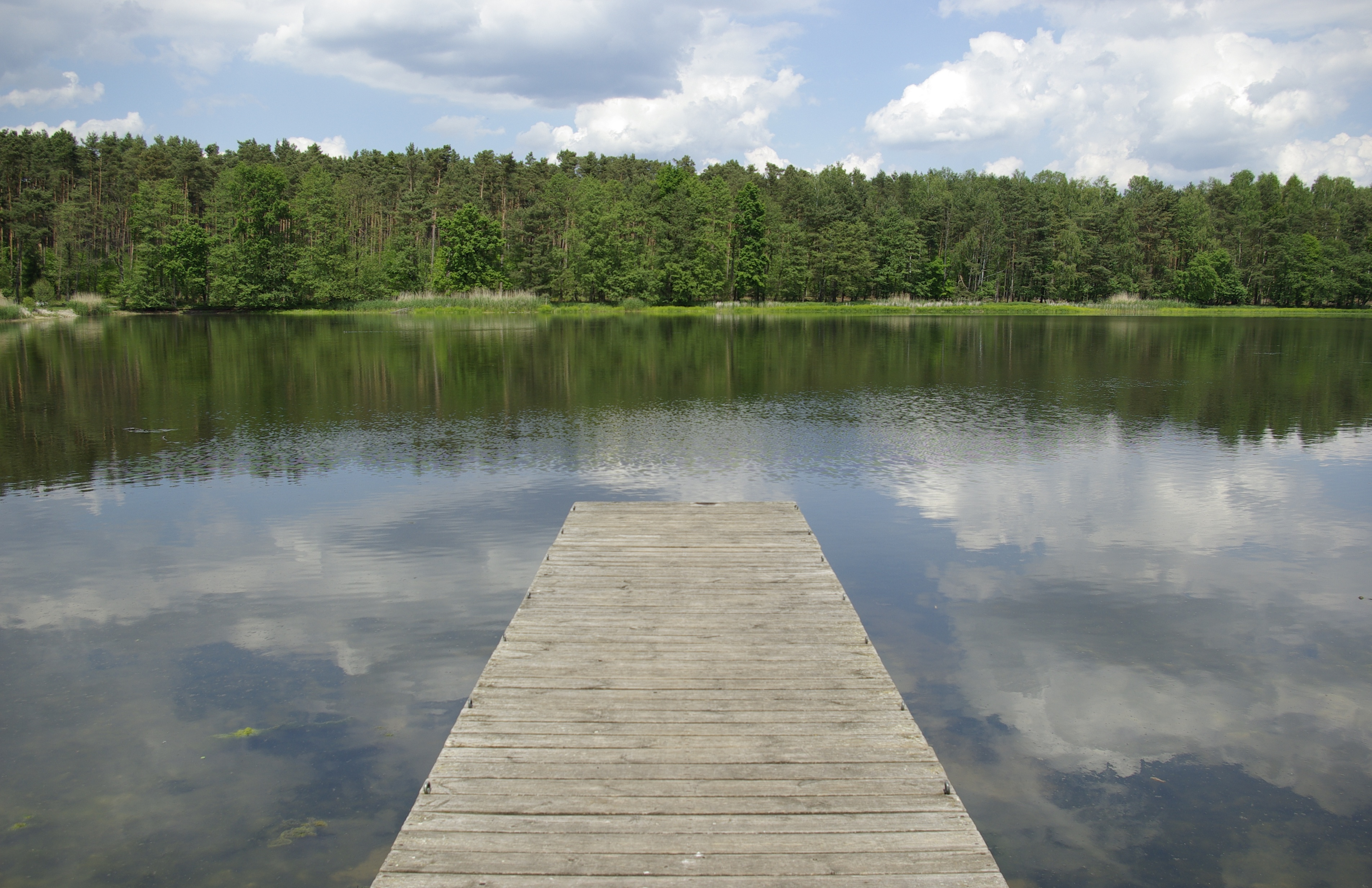 Blick zum nördlichen Ufer des Großen Bischofsweihers (Dechsendorfer Weiher). Der Wald dahinter gehört bereits zum gemeindefreien Gebiet Mark.